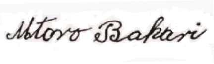 eigenhändige Signatur von Mtoro Bakari